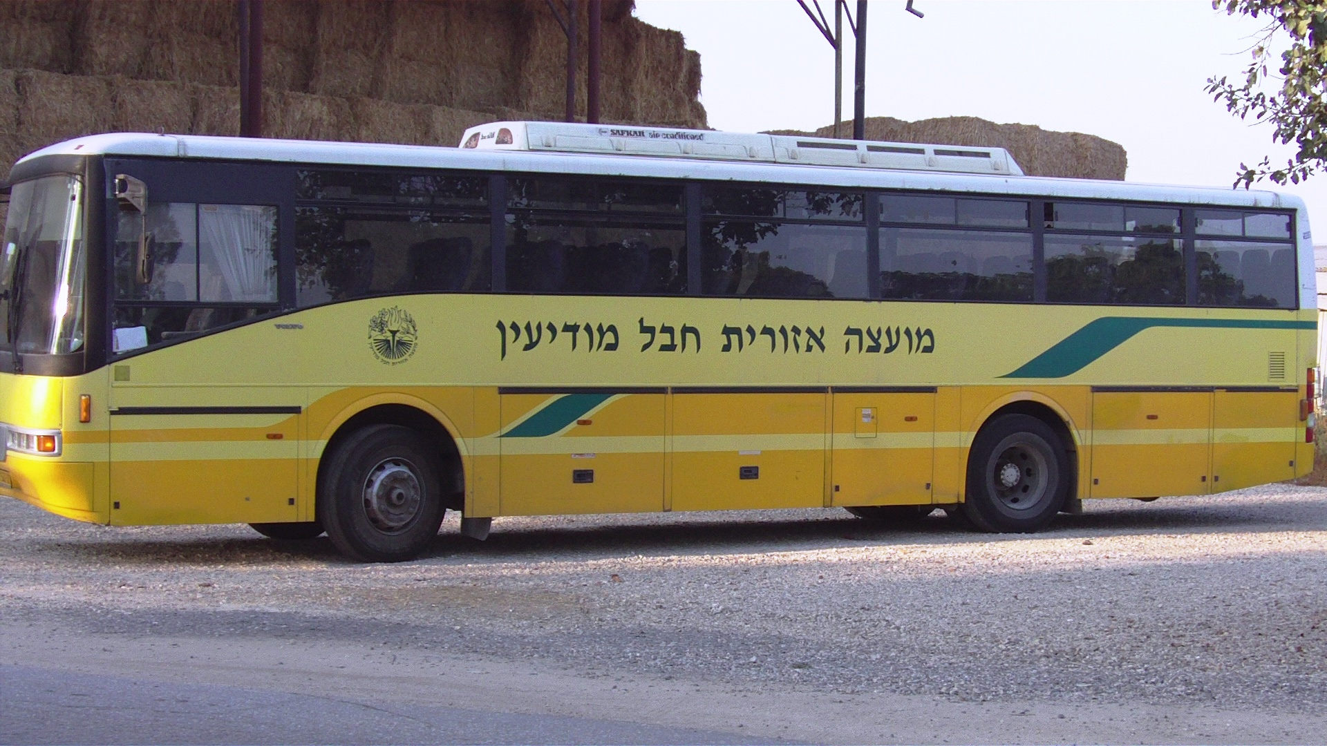 sdot negev חבל מודיעין